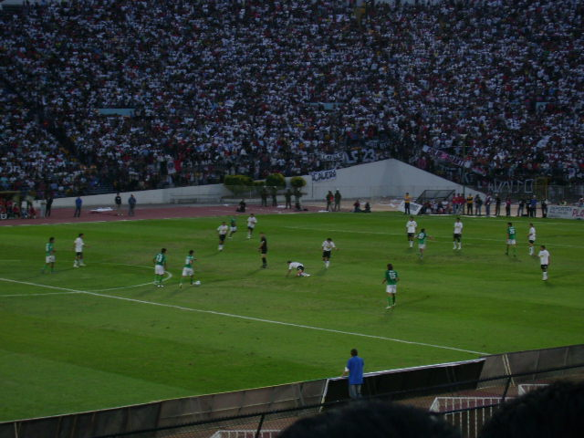 Final Audax Colo-Colofinal clausura 2006